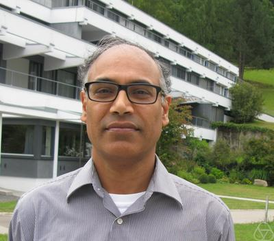 Foto di Kumar Murty